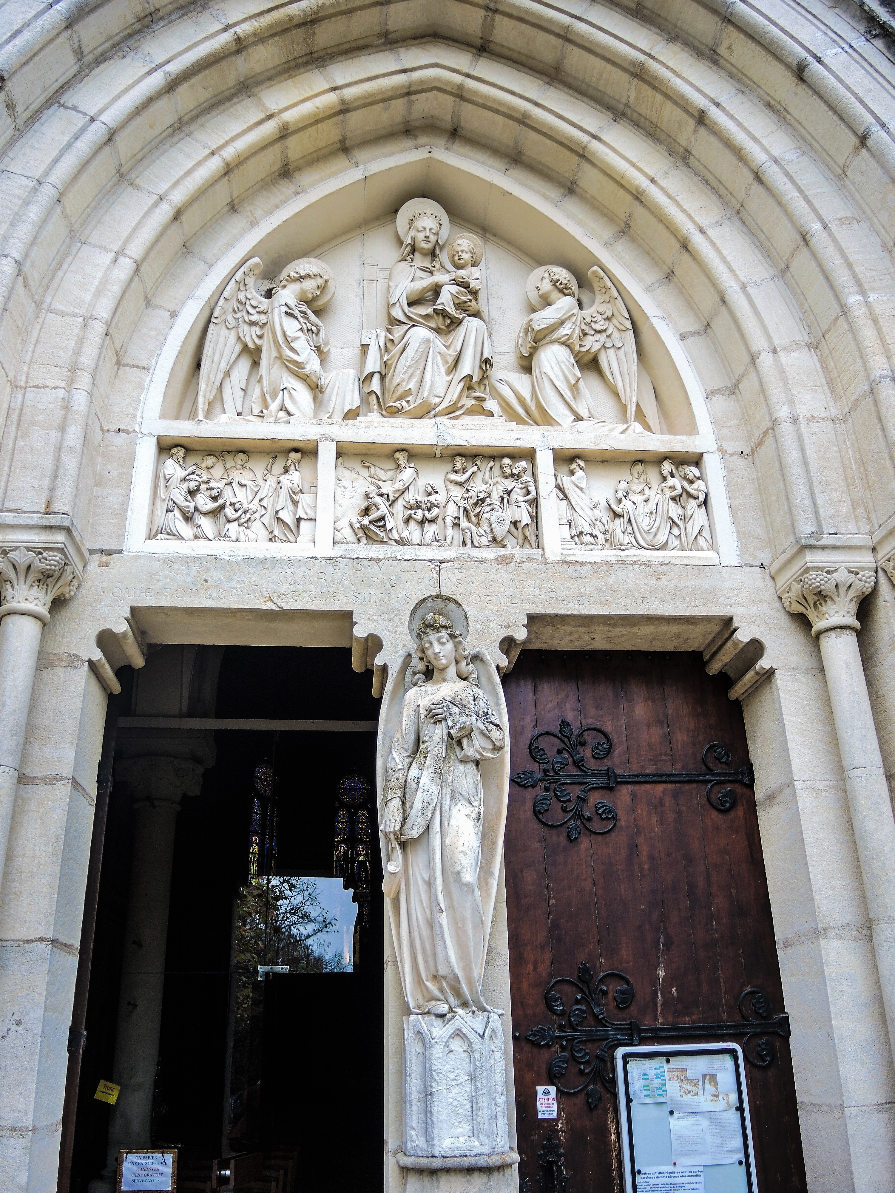 Portail et tympan de la basilique Notre-Dame du mont Roland. Jouhe. Jura.